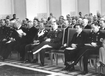 Scherl: Eröffnungssitzung der Deutschen Akademie der Luftfahrtforschung durch den Präsidenten, Generaloberst Göring. (Ehrensaal des RLM) Während des einleitenden Musikstückes. in der Mitte Generaloberst Göring, weiter rechts die Reichsminister Dr. Ohnesorge und Darré, links von Göring General der Flieger, Staatssekretär der Luftfahrt Milch, die Reichsminister Gürtner und Dorpmüller und Staatssekretär Lammers.